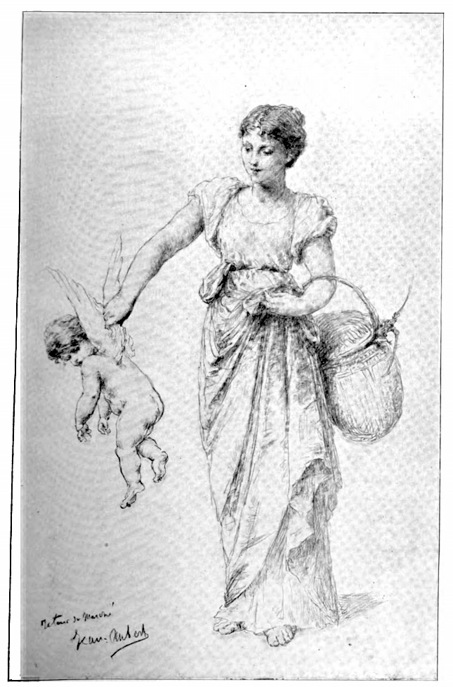 Retour de marché, d'après un dessin signé Jean Aubert. Traces de détramage [photogravure].